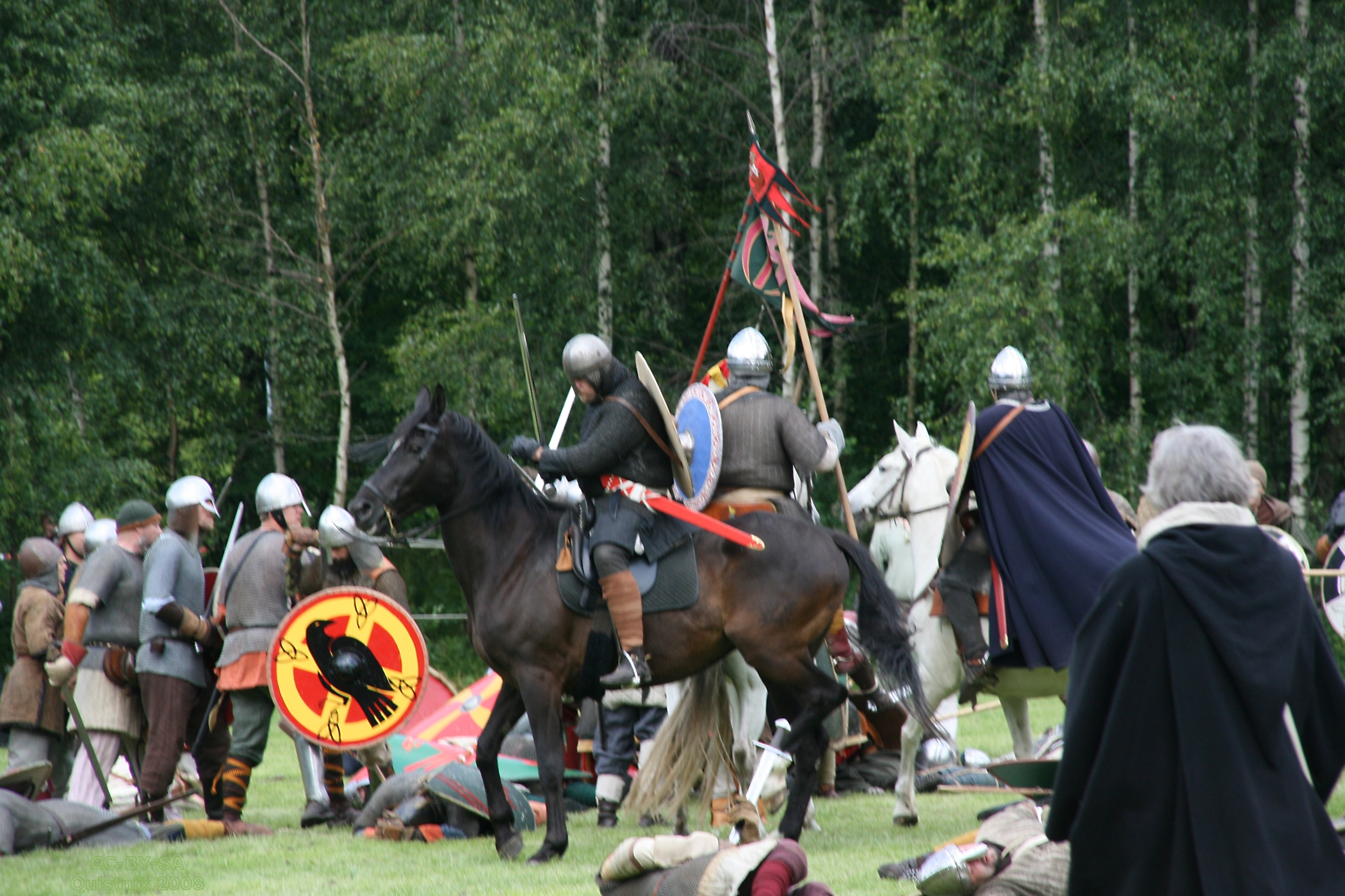 Vlaardingen: reenactment Slag bij Vlaardingen: Duitse cavalerie